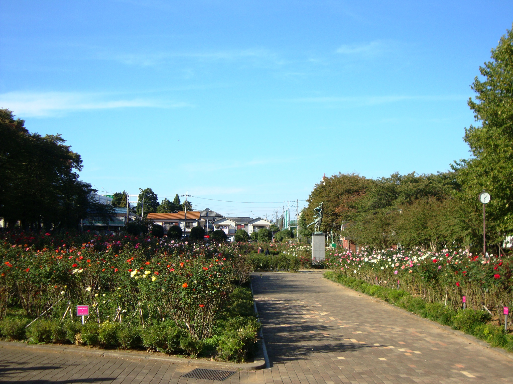 与野公園のバラ園（11月撮影）。